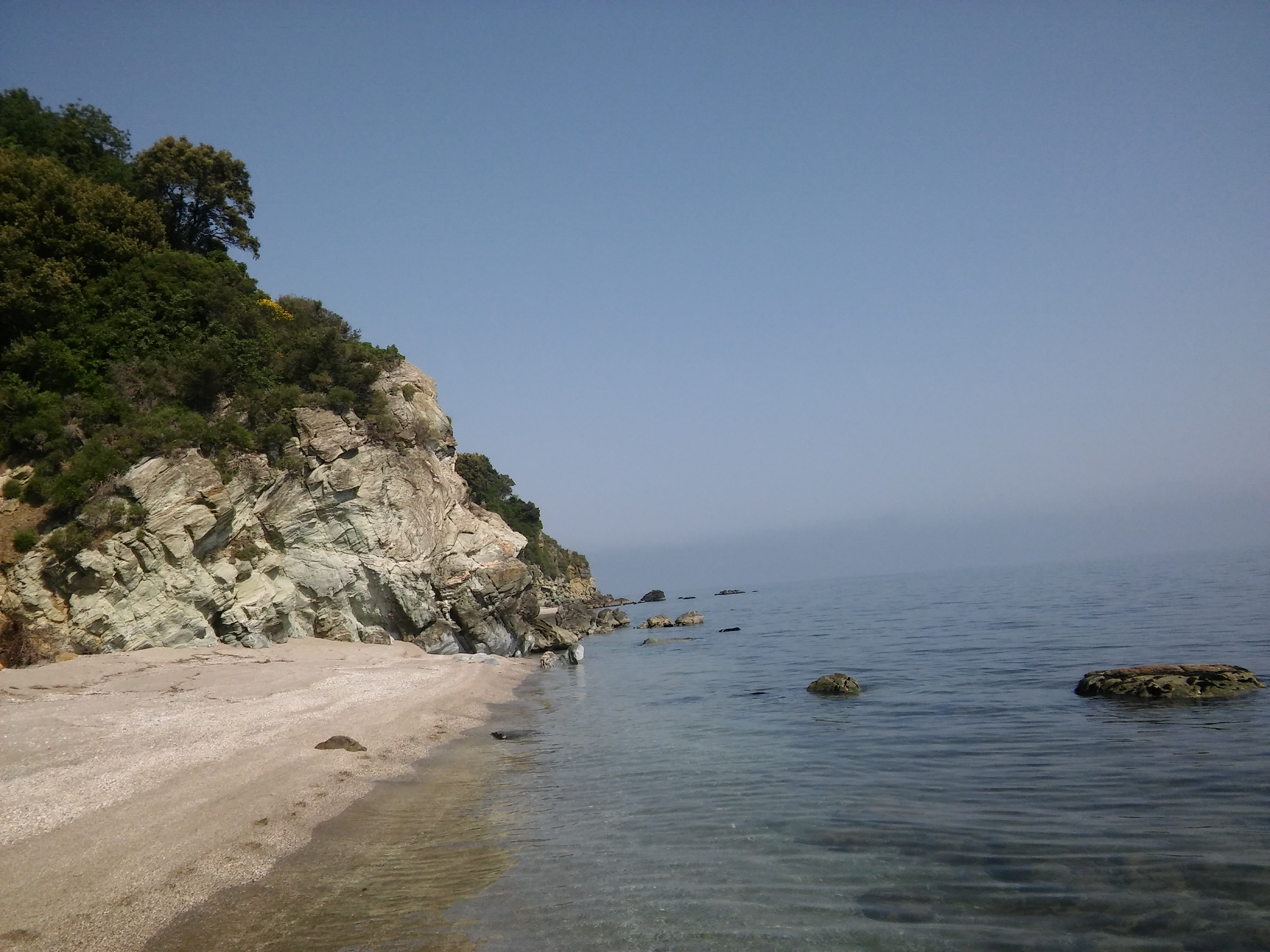 Widok jednej z plaż w Kokino Nero